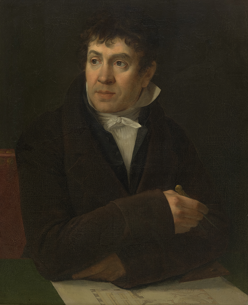 Portret van Joseph François van Gierdegom (Joseph Ducq, 1814); collection: Musea Brugge - Groeningemuseum